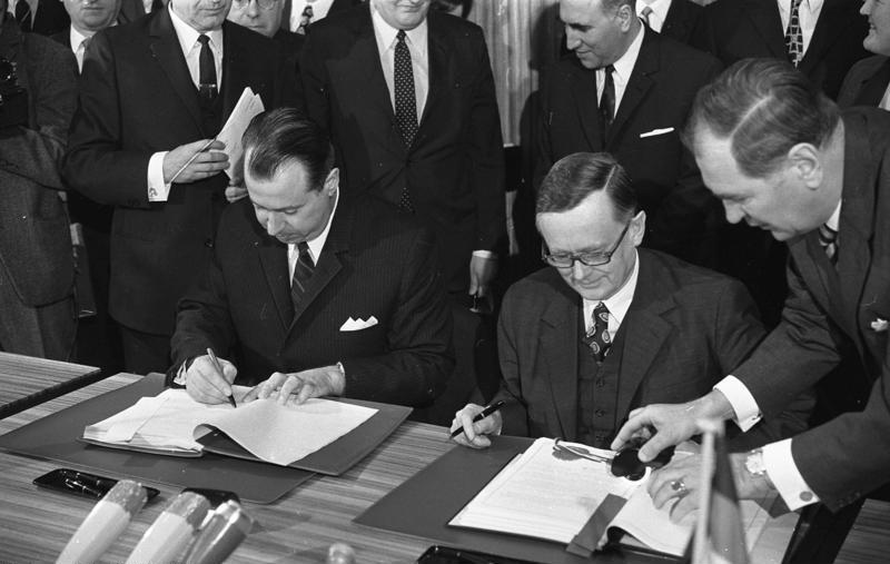 Unterzeichnung eines Wirtschaftsabkommens zwischen der BRD (BM Schiller) und Bulgarien (Außenhandelsminister Awramow)